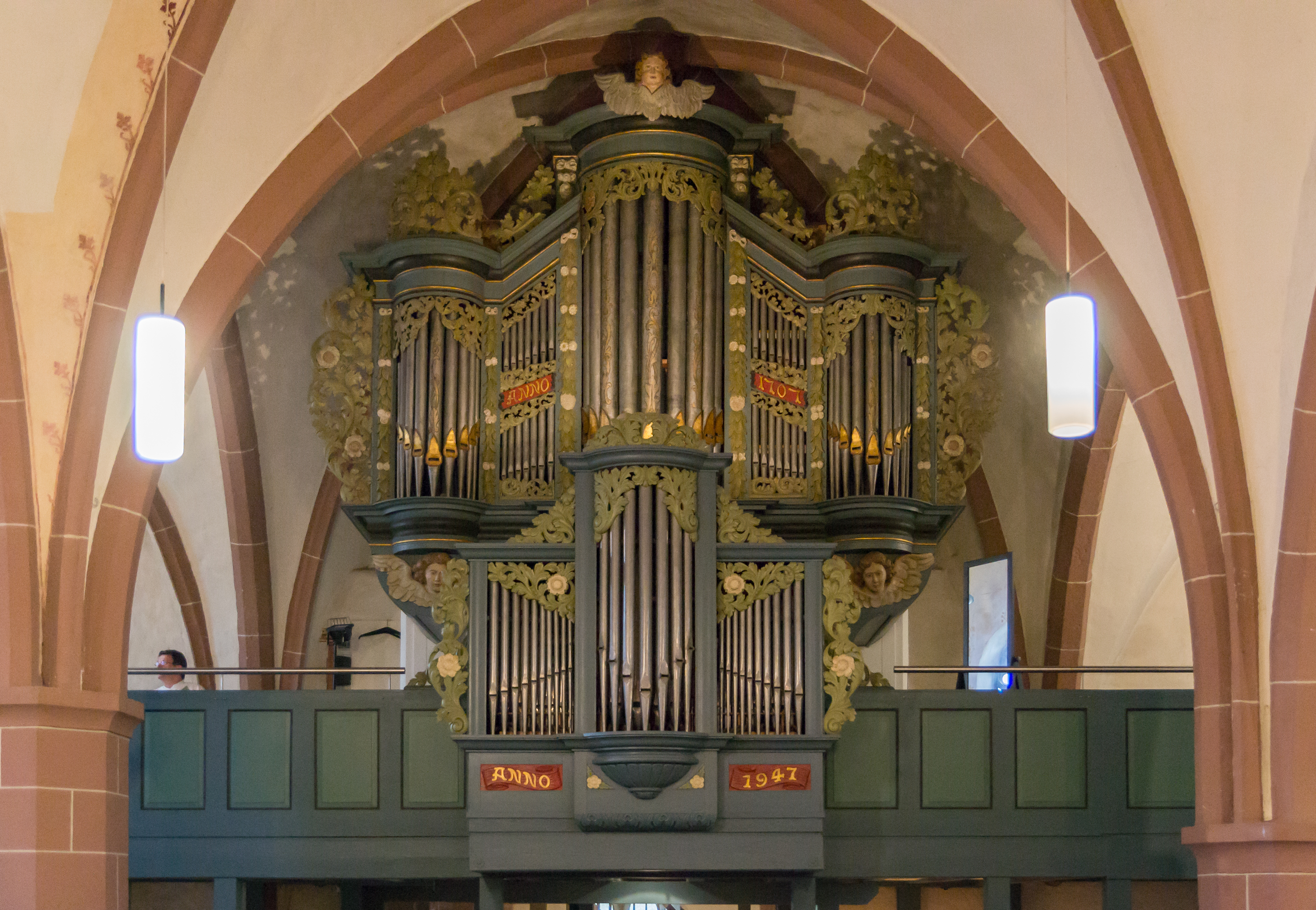 Marktkirche Lage, Orgel von Johannes Fincke (ohne Blitz)